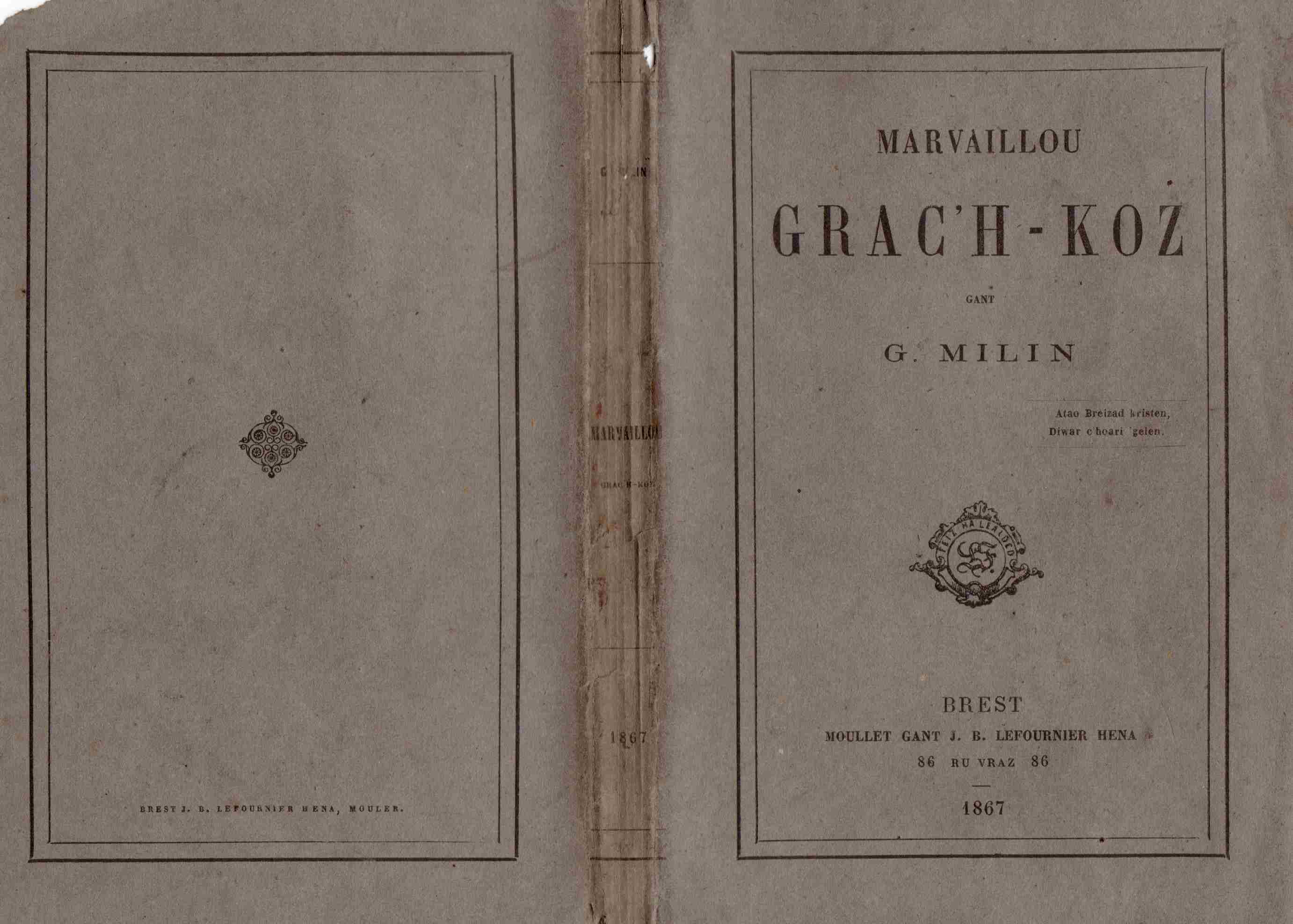 Couverture du livre de Gabriel Milin en breton : Marvaillou , Grac'h-Koz imprimé en 1867 par Brest - Moullet gant J. B . Lefournier Hena, 86 ru vraz avec quelques notes en français